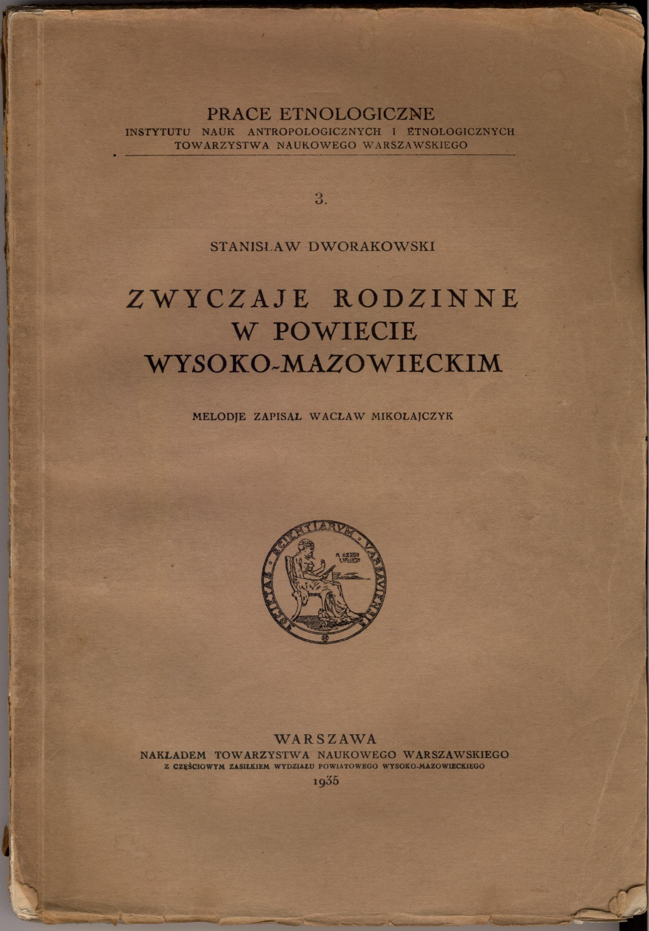 Zwyczaje rodzinne w powiecie Wysoko-Mazowieckim, Nakł. Towarzystwa Naukowego Warszawskiego, 1935 r.